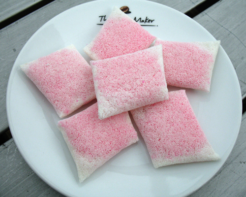 Bunga Kuda, tradional dessert of Satun and Perlis of Malaysia.